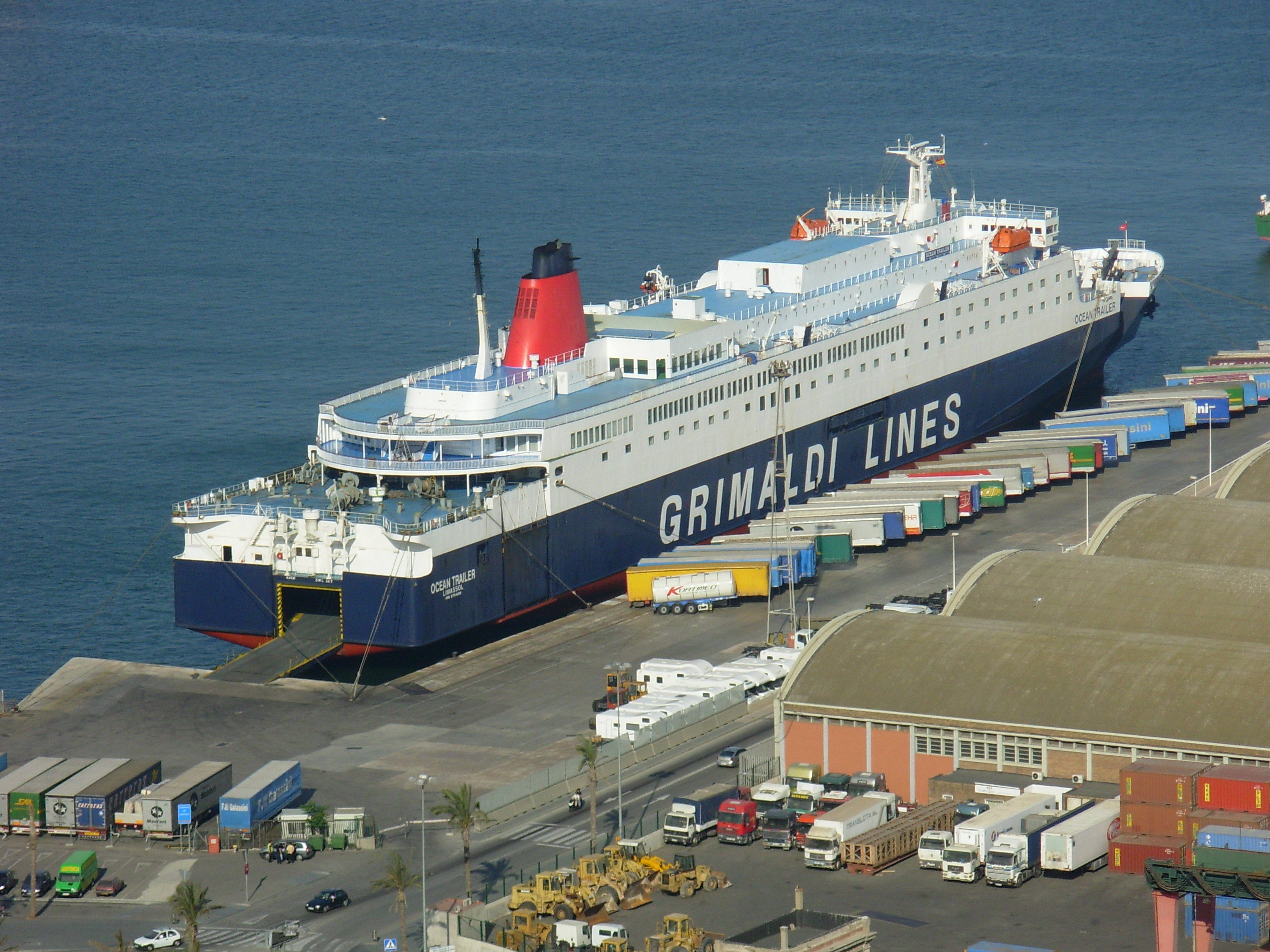 Ocean Trailer de Grimaldi al Port de Barcelona, Catalunya.